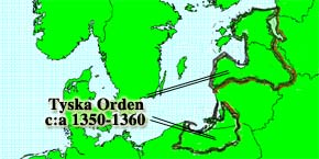 Egentillverkad karta för Tyska Orden